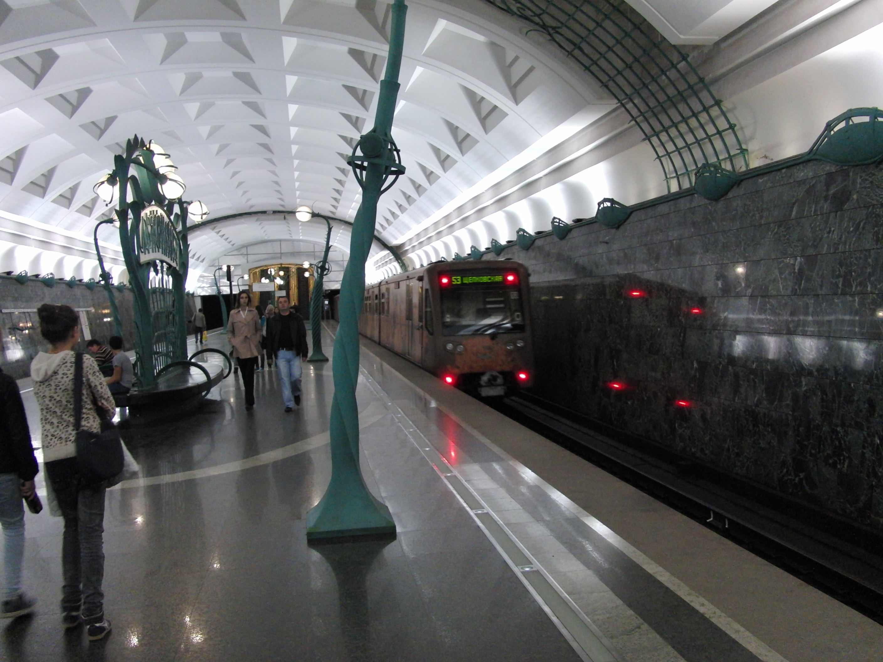 Aquarel (Watercolor) train at Slavyansky Bulvar station (Метропоезд Акварель на станции Славянский Бульвар)